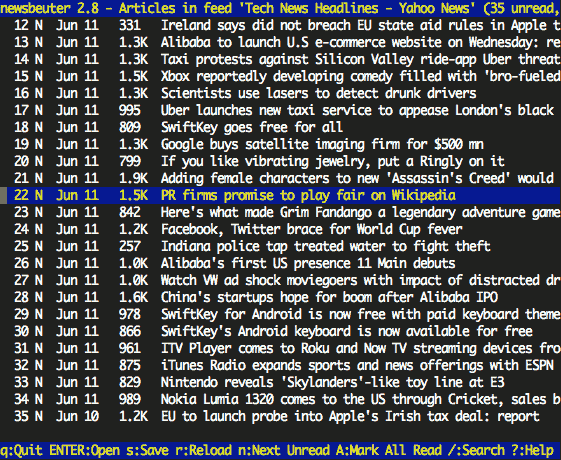 Newsbeuter en action